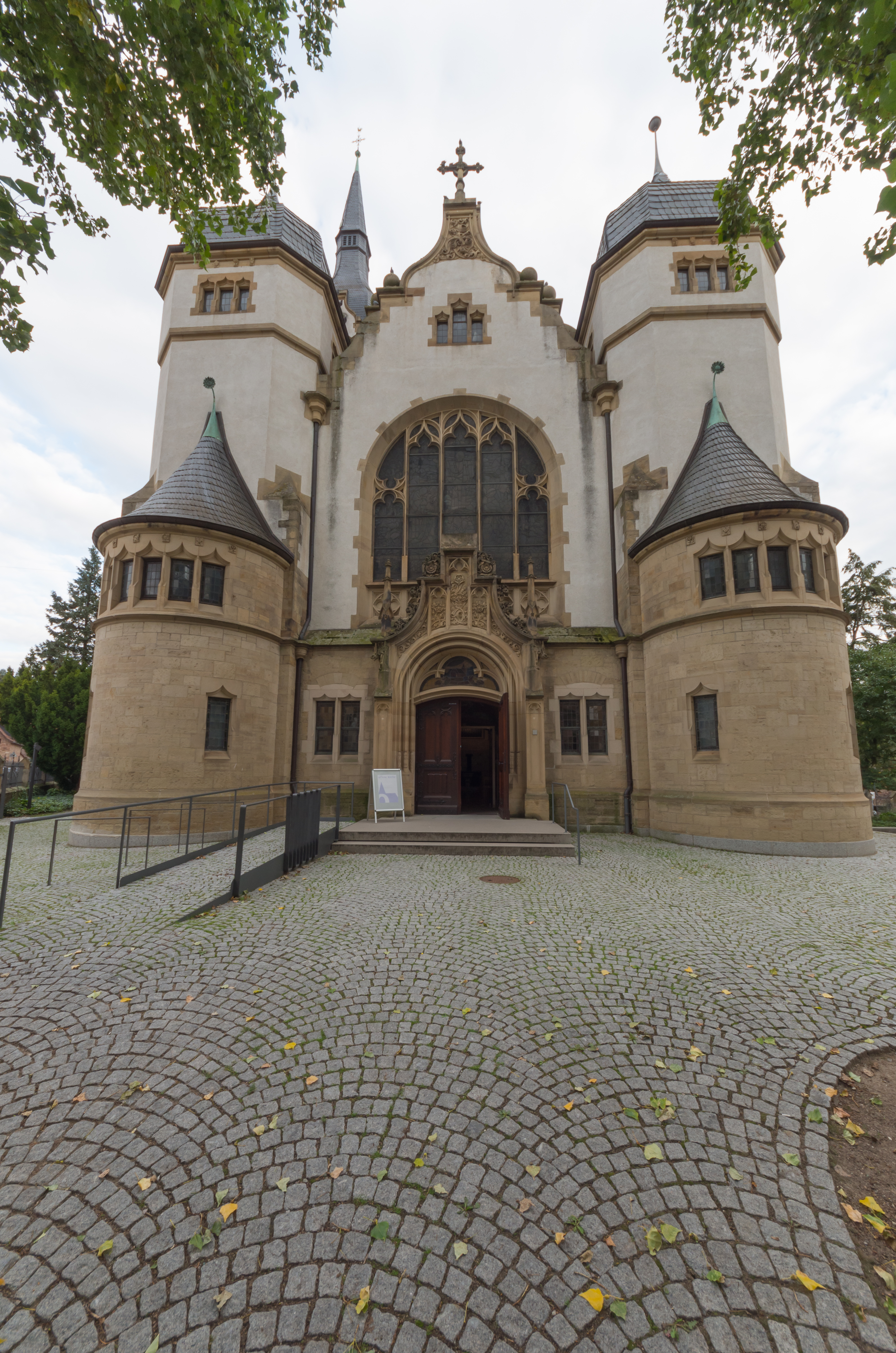 Evangelische Friedenskirche Heidelberg-Handschuhsheim